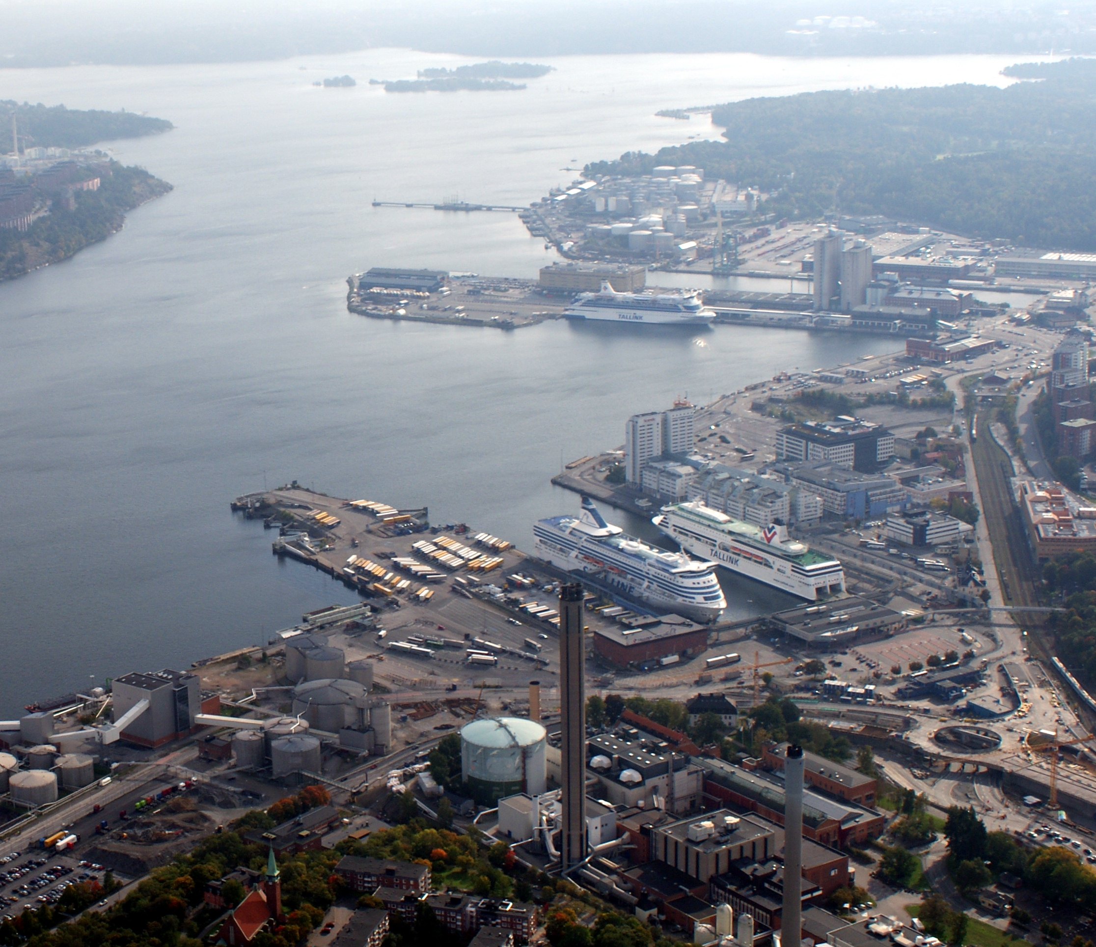 Värtahamnen sedd från helikopter.